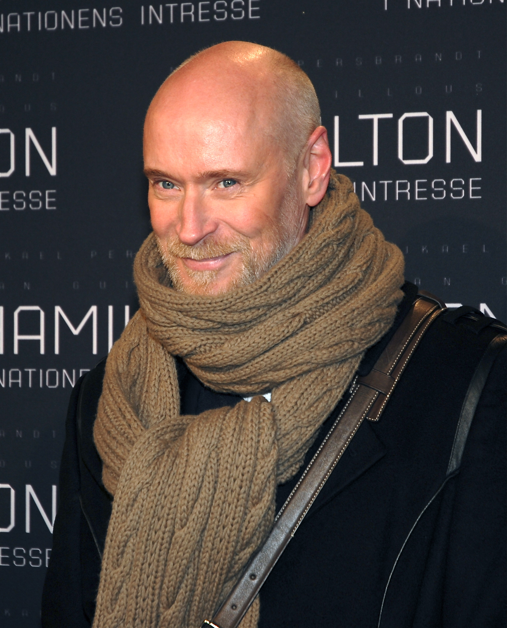 Lars Wallin på galapremiären av Hamilton - I nationens intresse, på biograf Sergel i Stockholm den 9 januari 2012.